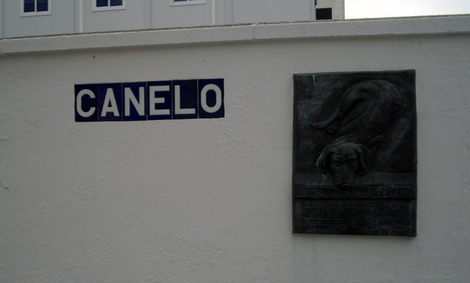 street and plaque honoring canelo